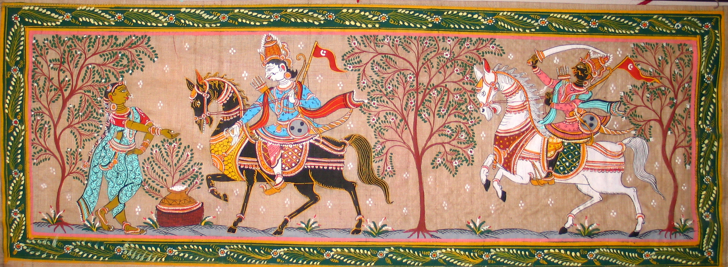 Peinture Patta Chitra - Patta Chitra Painting